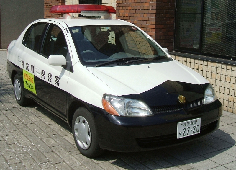 Toyota Platz.